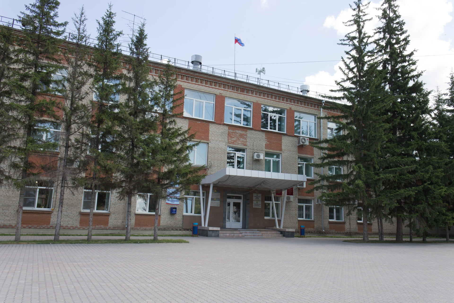 ул. Пушкина, 51